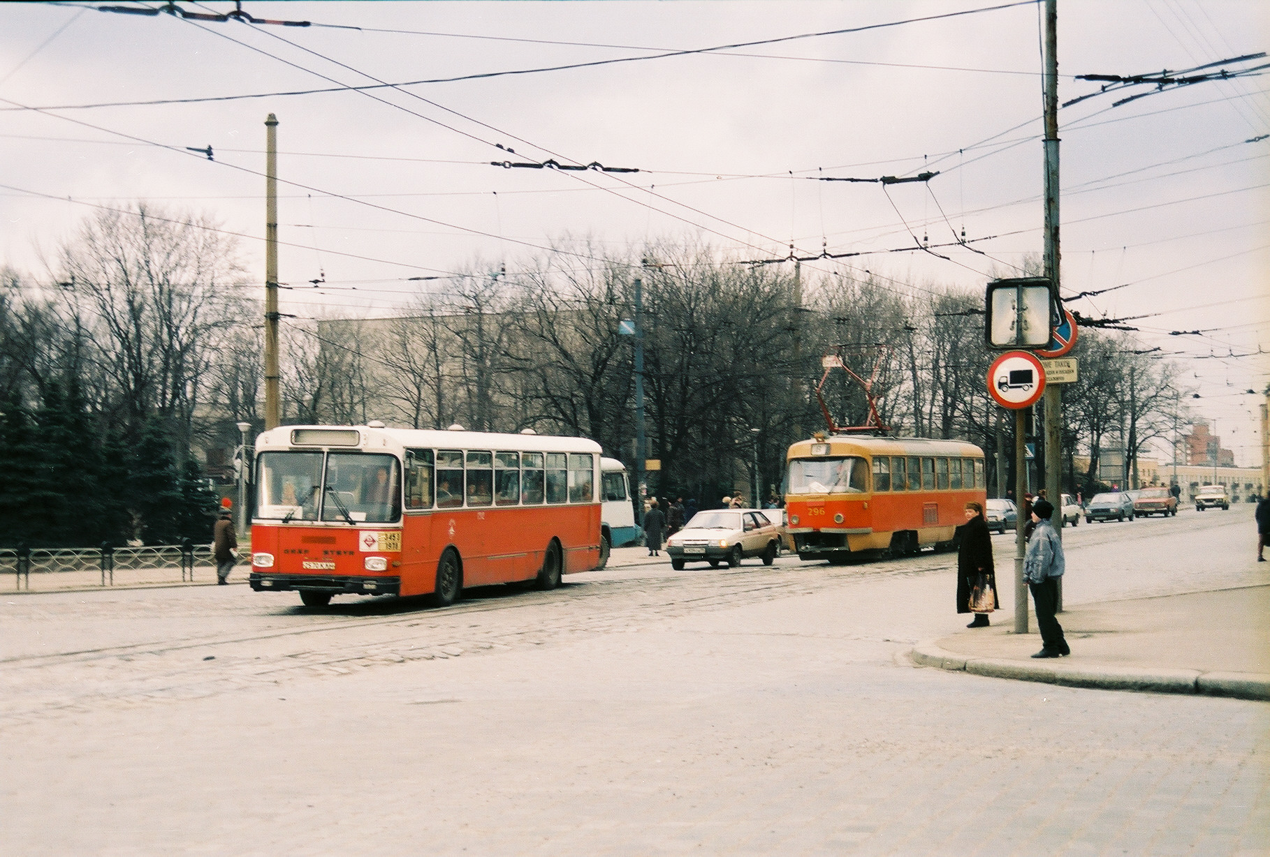 Ул. Черняховского, Kaliningrad, Februar 1995